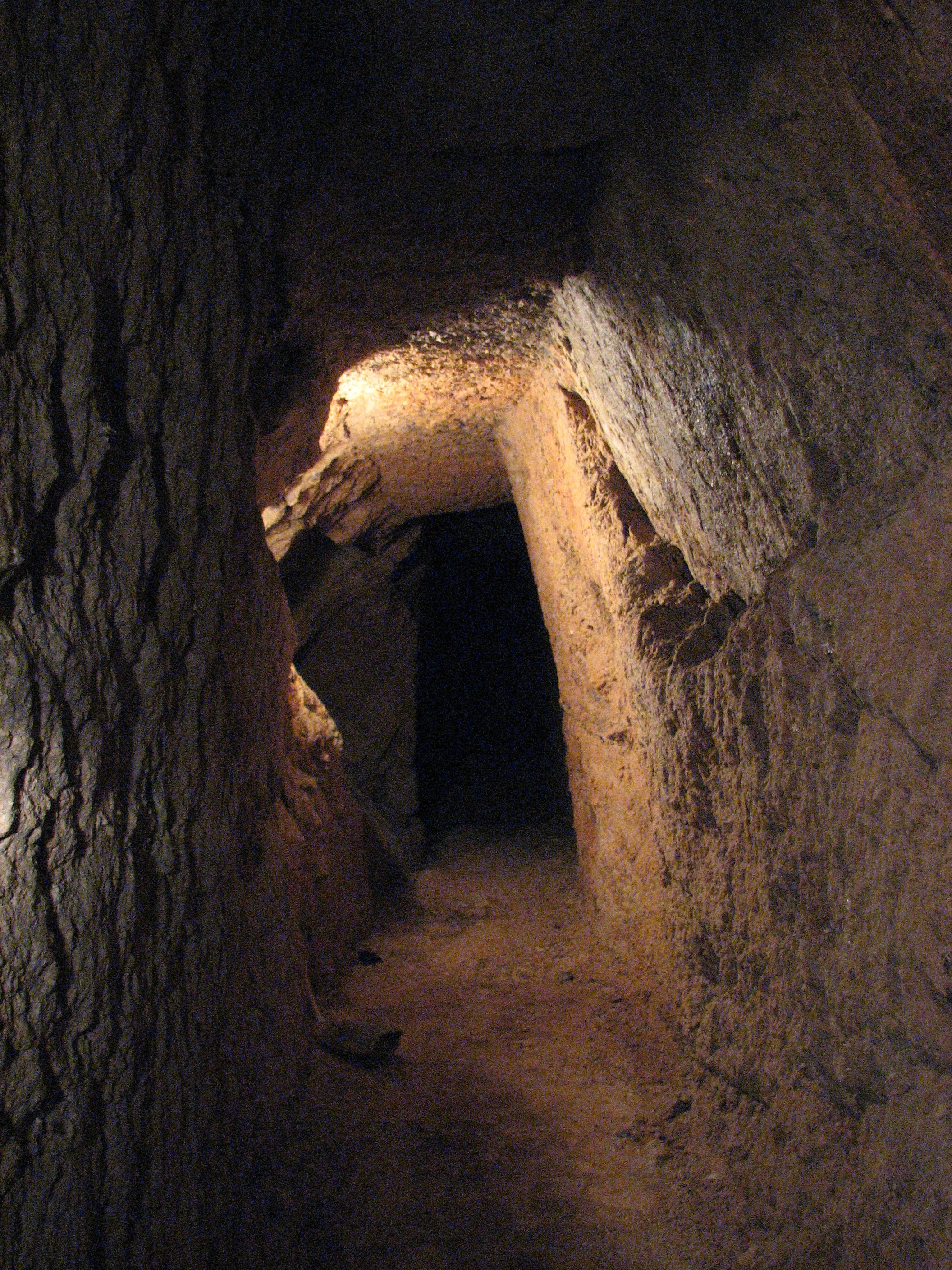 Weisse Grube Imsbach Stollenprofil